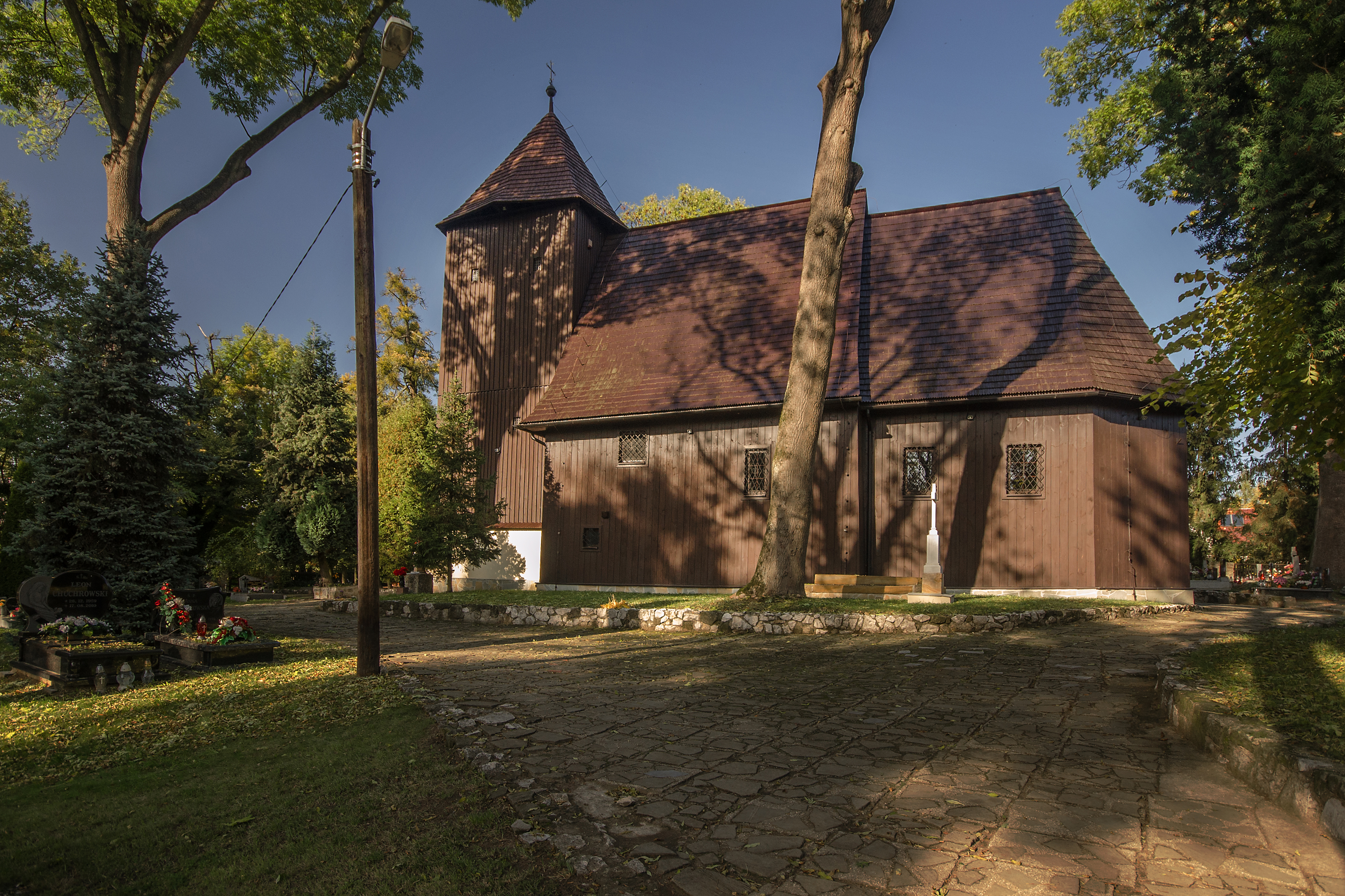 Bąków, kościół par. p.w. Wniebowzięcia NMP, XV, XVIII